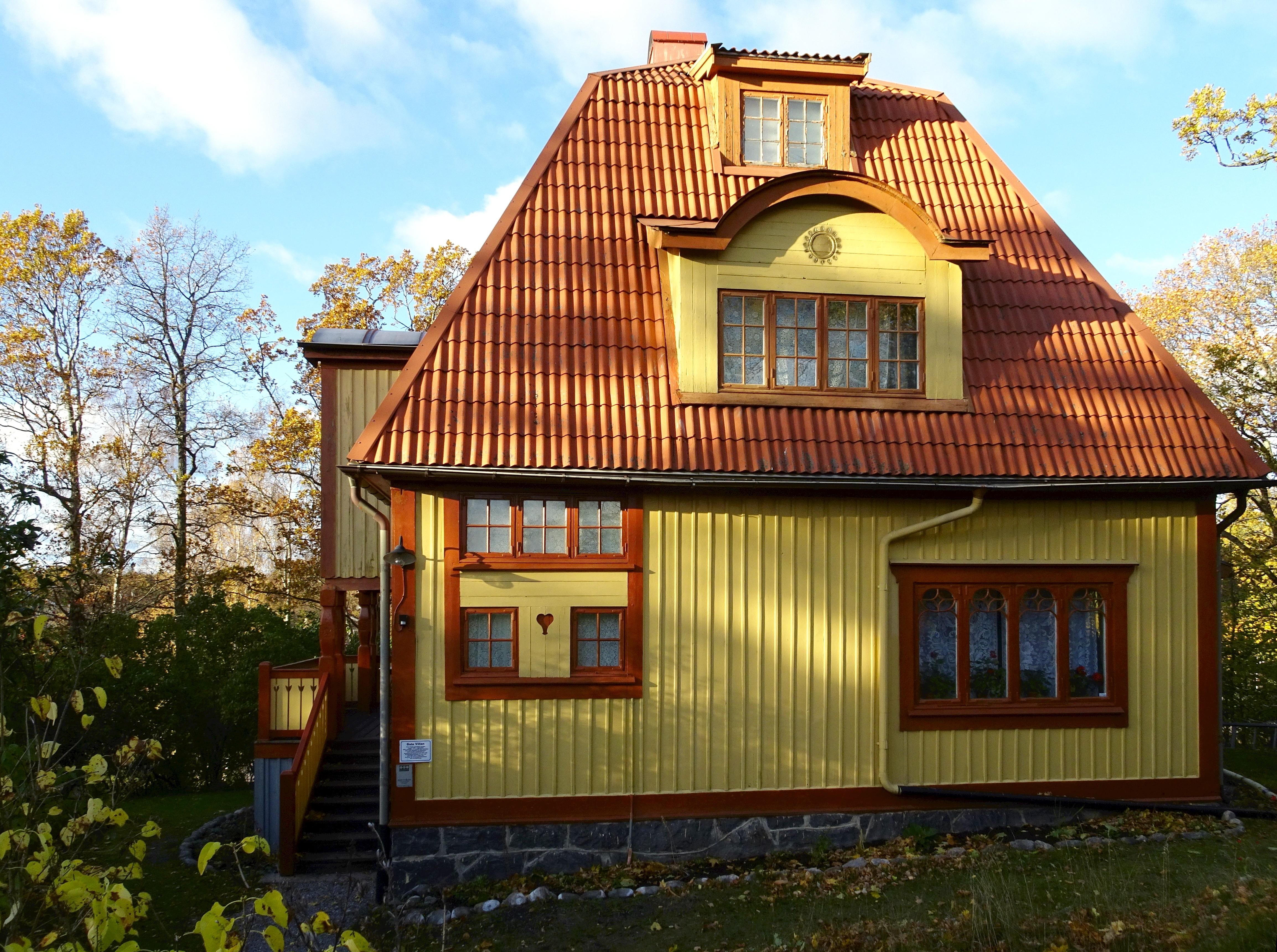 Sotholms Härads Hembygdsgård, Gula Villan, arkitekt Karl Güettler